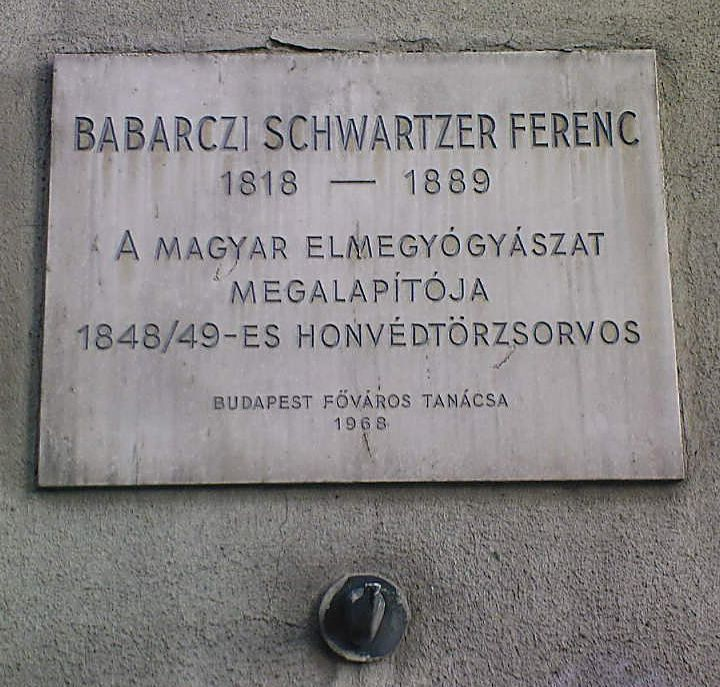 Babarczi Schwartzer Ferenc orvos emléktáblája, Budapest XII. kerület, Schwartzer Ferenc utca (Alkotás utca sarok)